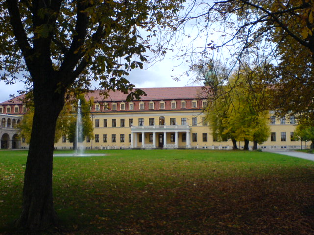 Sondershausen Barockflügel Gartenseite